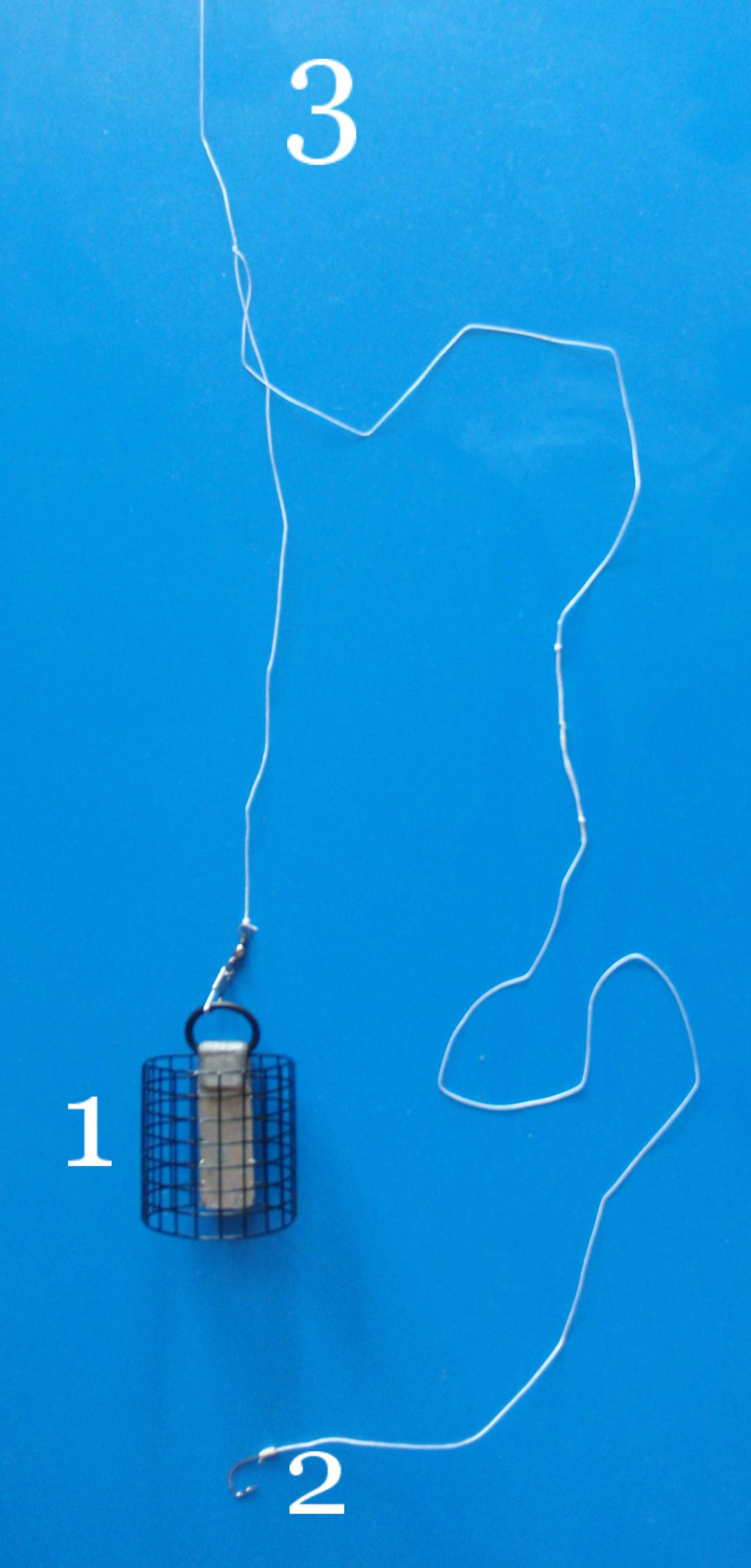 Feeder Montage (dickere Schnur und größerer Haken zur Veranschaulichung)